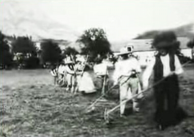 Scène de fanage (retournement de l'herbe fauchée pour en faire du foin), filmée en 1895 par Louis Lumière